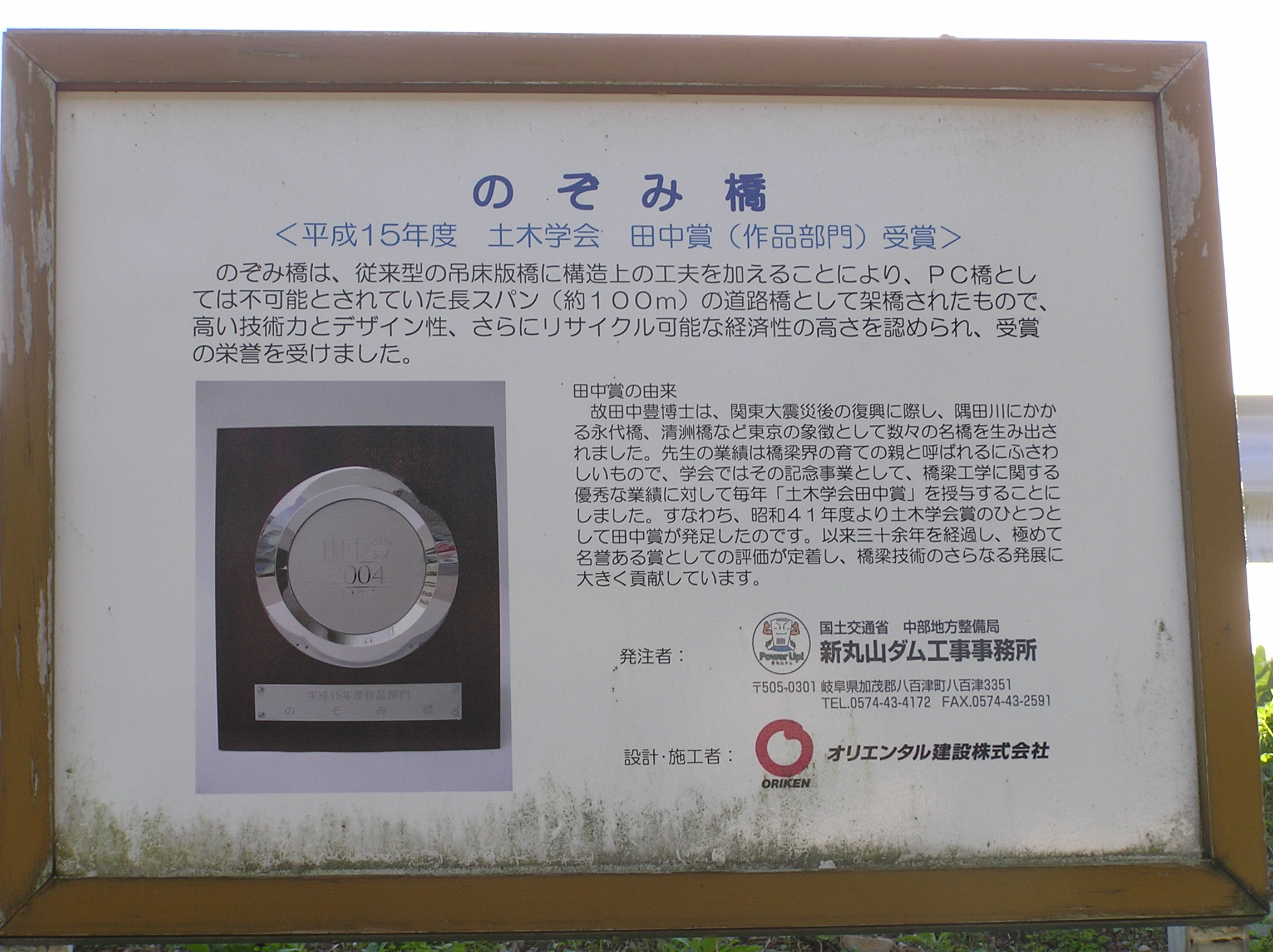 のぞみ橋(岐阜県可児郡御嵩町、加茂郡)、田中賞受賞の掲示。